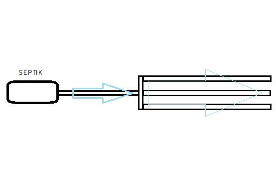 Imbväljaku süsteem - voodi